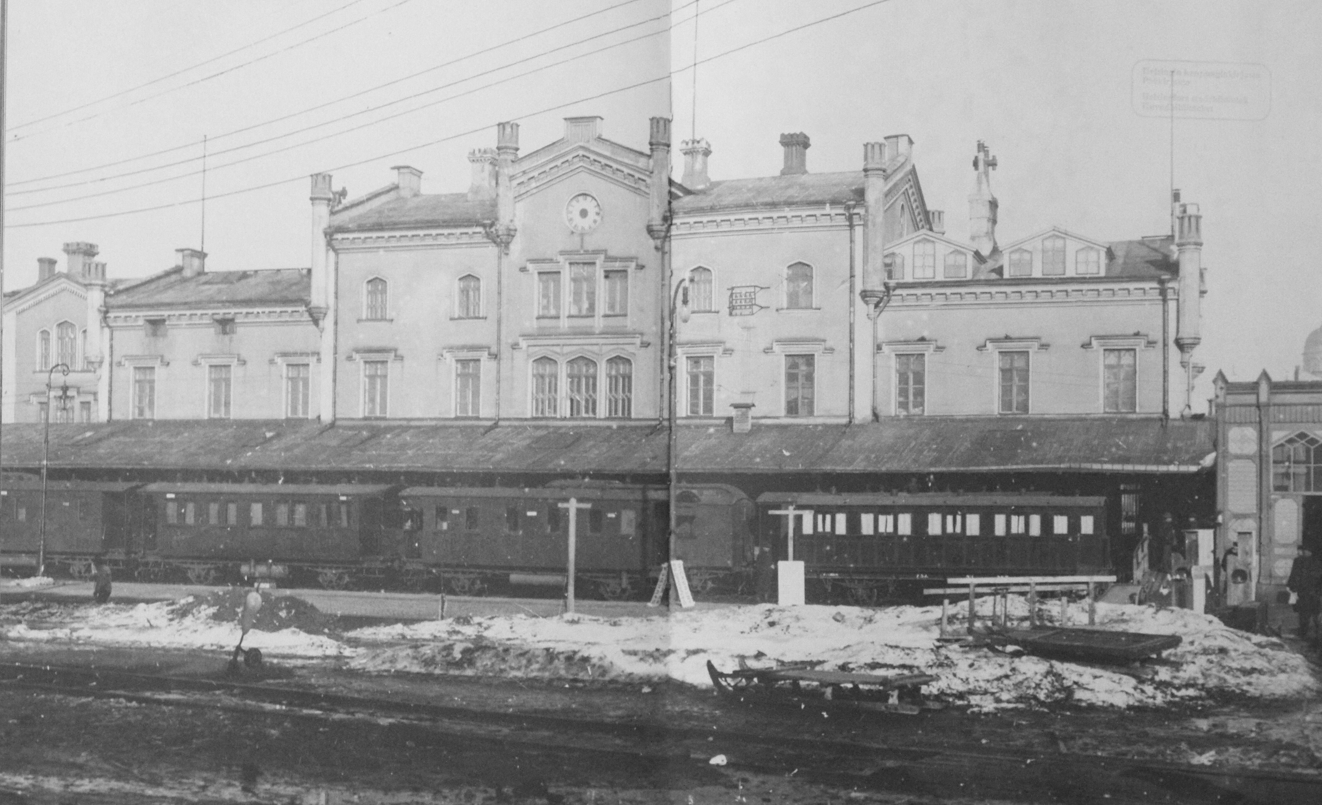 Helsingin vanha rautatieasema kuvattuna raiteiden puolelta.